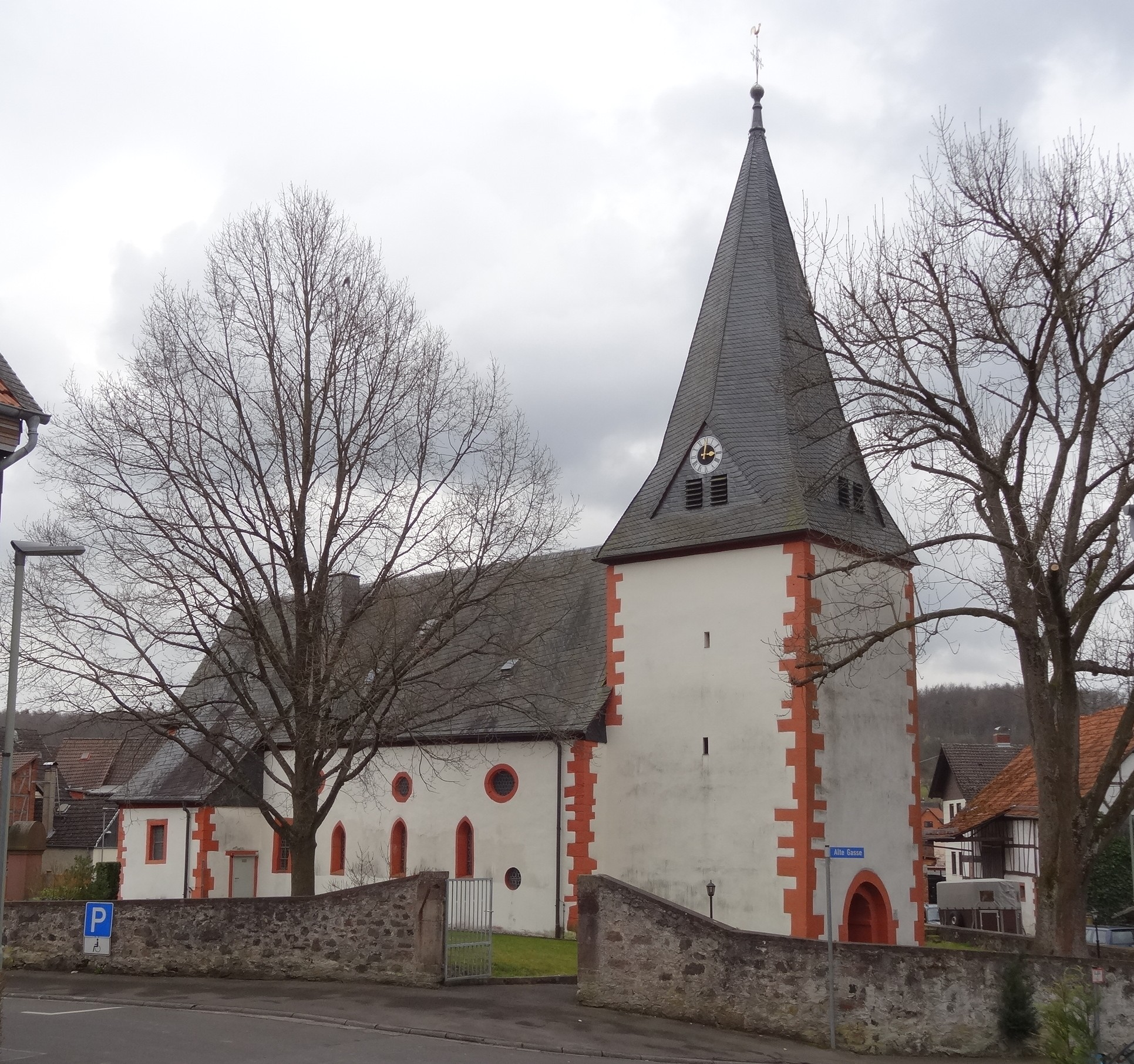 Evangelische Pfarrkirche (Schwickartshausen). Jahresbericht der Denkmalpflege im Volksstaat Hessen IVa, 1913-1928, Staatsverlag, Darmstadt 1930, S.211-214